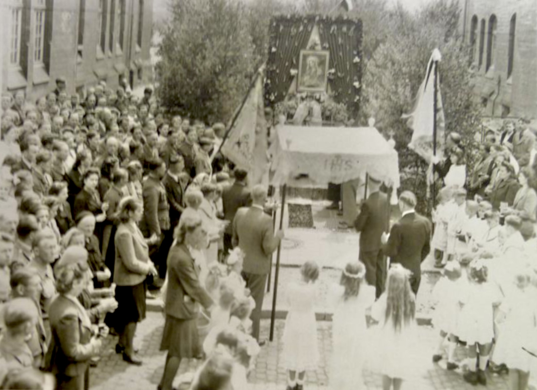 Boże Ciało w 1946 roku w obozie dipisów